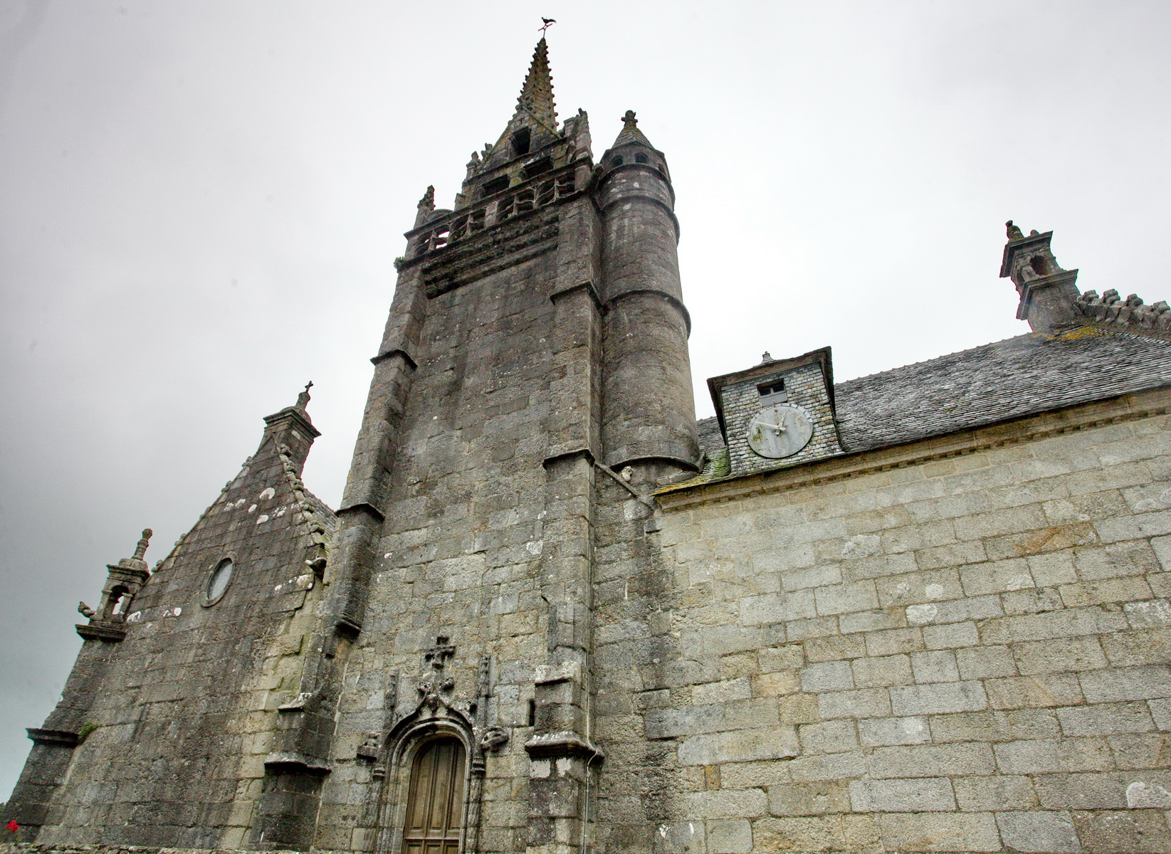 Enclos paroissial de Guimiliau (Classé) .